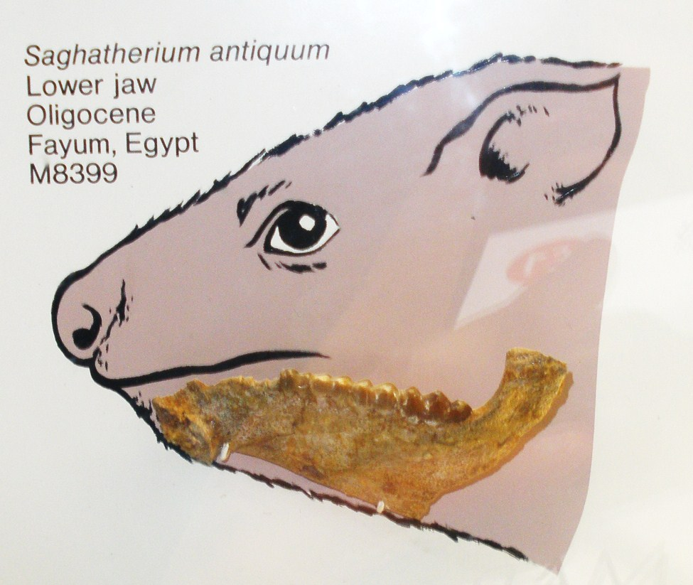 Fossil of Saghatherium, an extinct mammal -- Took the photo at Natural History Museum, London